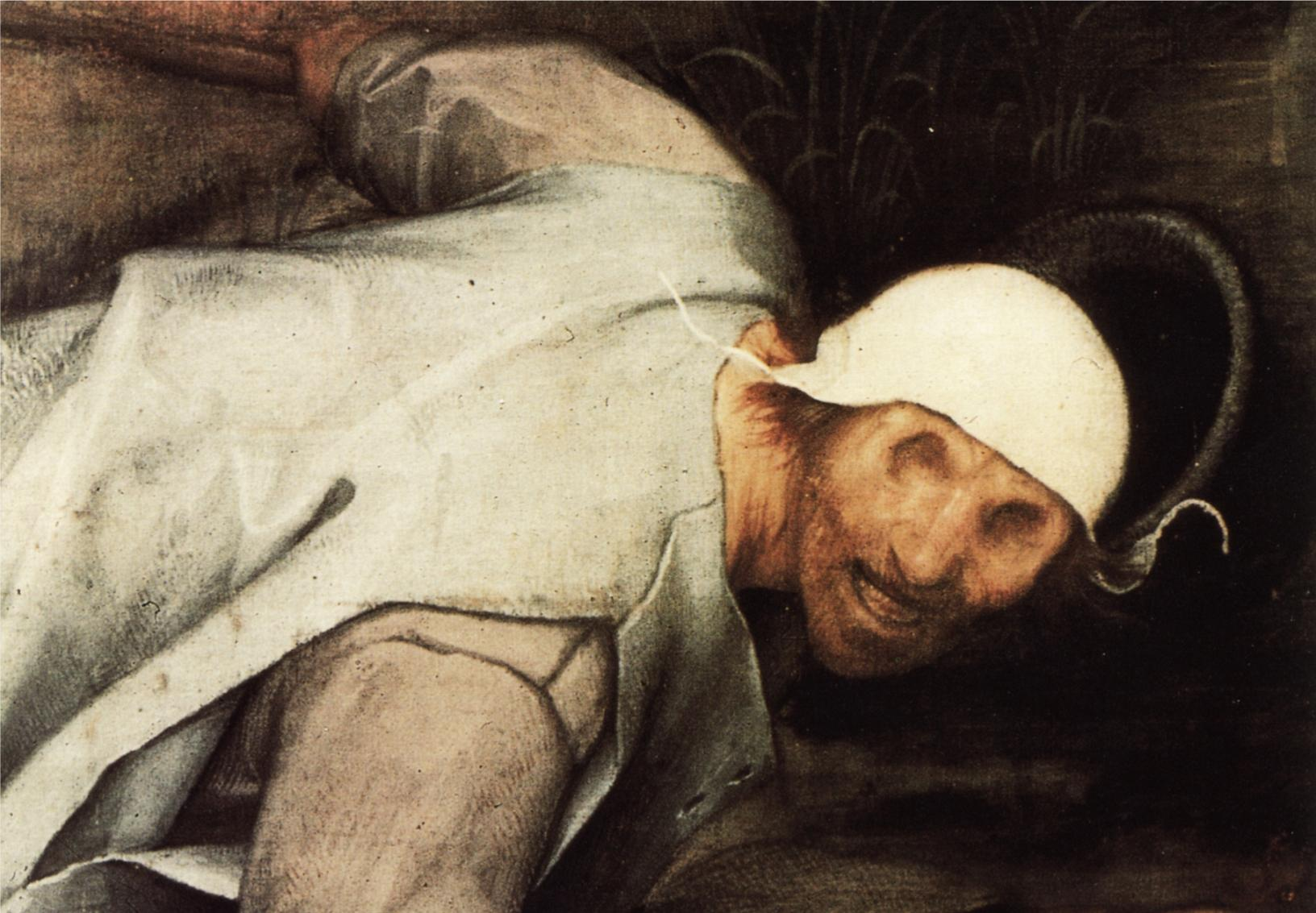 Ausschnitt aus Bruegels Gemälde Der Blindensturz